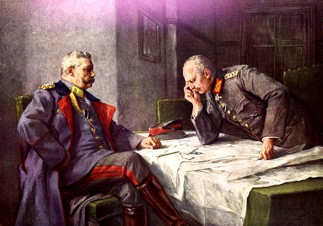 Paul von Hindenburg (left) and Erich Ludendorff. Painting by Professor Hugo Vogel.